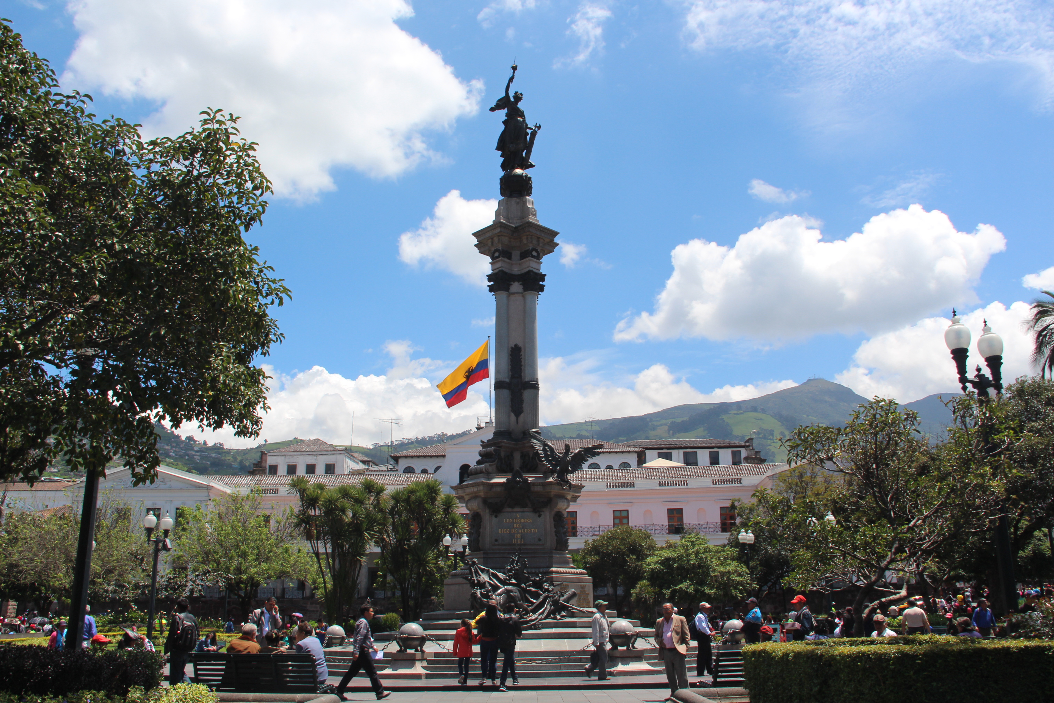 Frontal del monumento, atrás el Palacio de Carondelet con el tricolor ecuatoriano ondeando al viento, atrás Pichincha cuna de la ultima batalla por la libertad e independencia quiteña (posteriormente Ecuador).